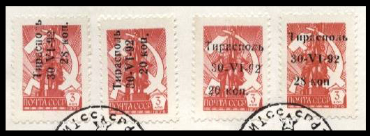 Провизорные марки Тирасполя (ПМР). Надпечатка на марках СССР, 1992